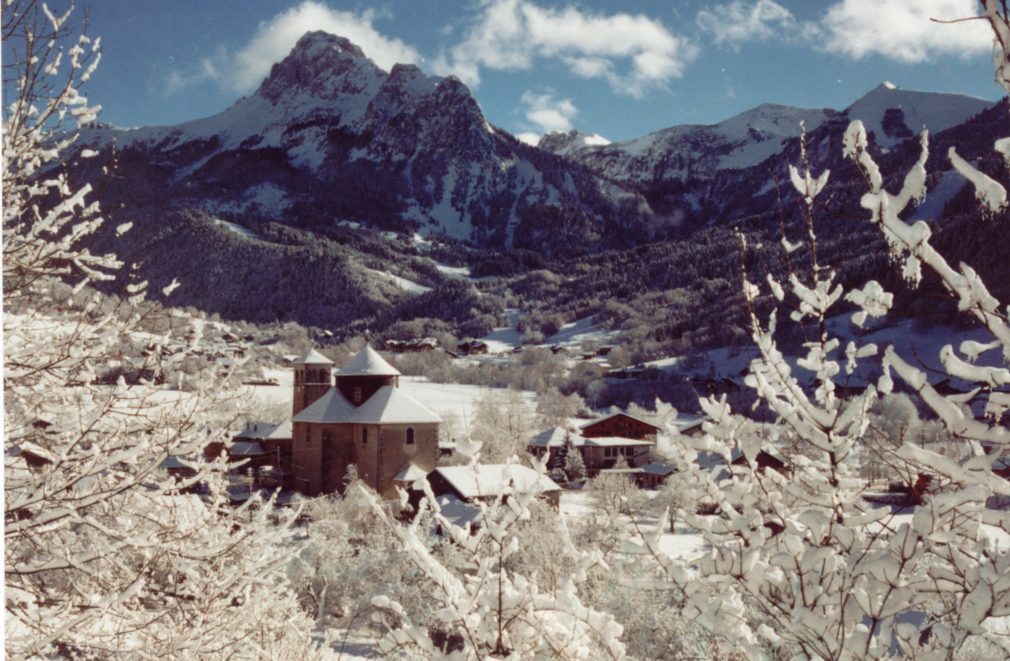 Eglise de Bernex - Haute Savoie - en hiver